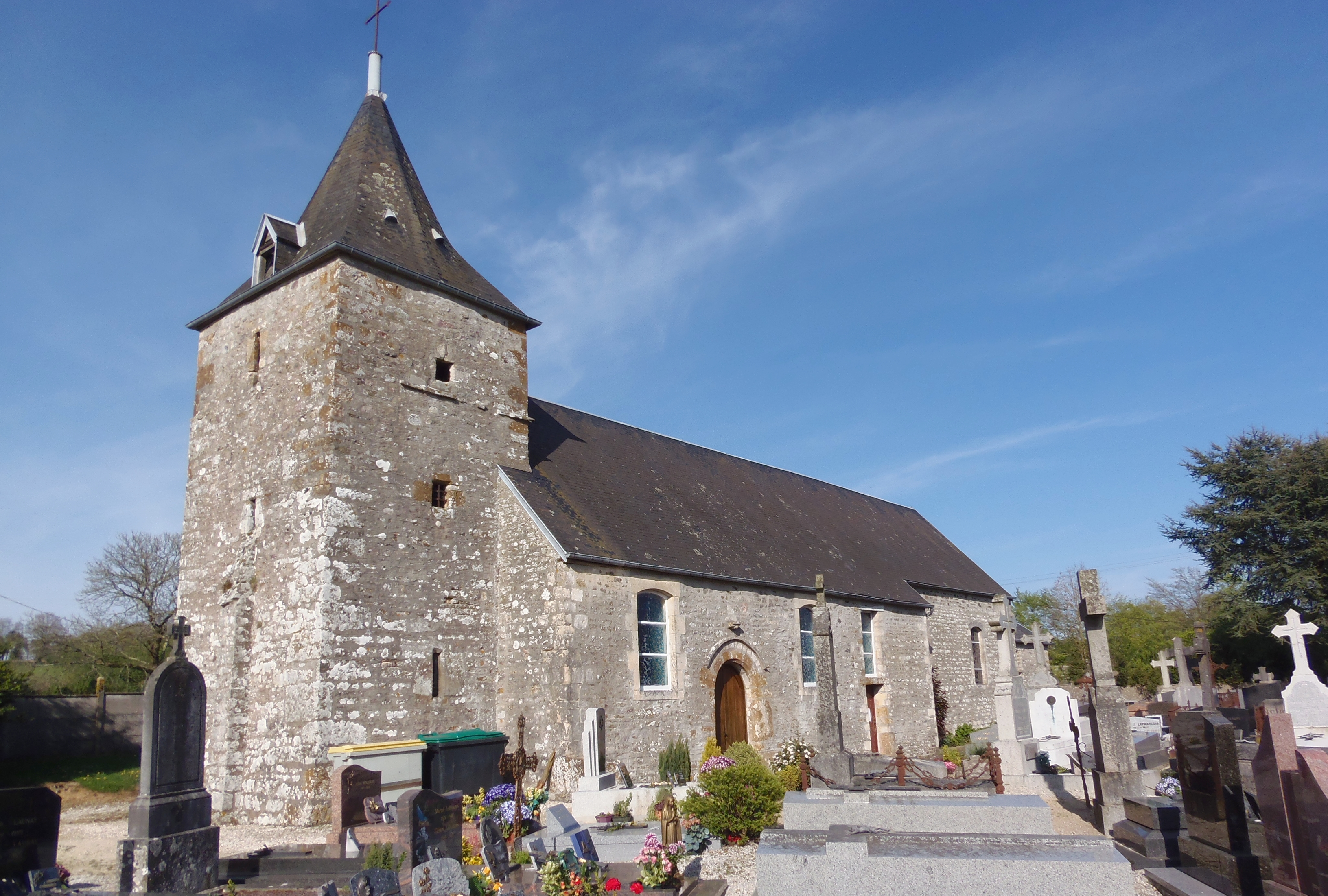 Roucamps (Normandie, France). L'église Saint-Laurent